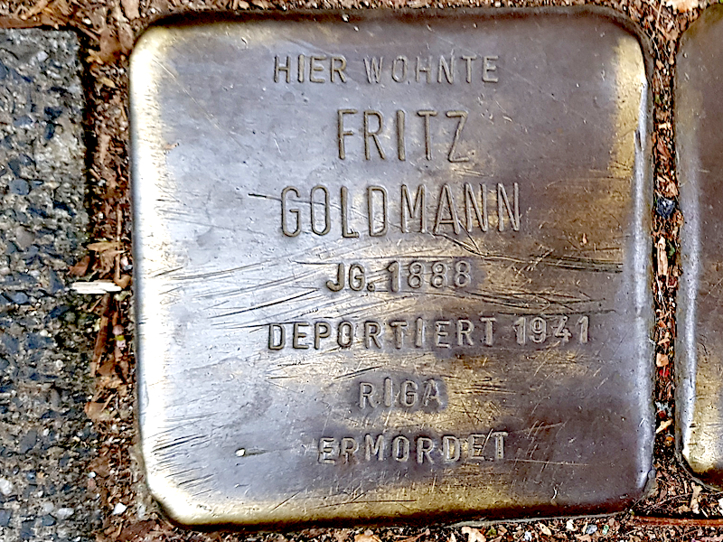 Stolperstein für Fritz Goldmann, Grabens. 27, Duisburg-Neudorf, deportiert 1941, Riga, ermordet